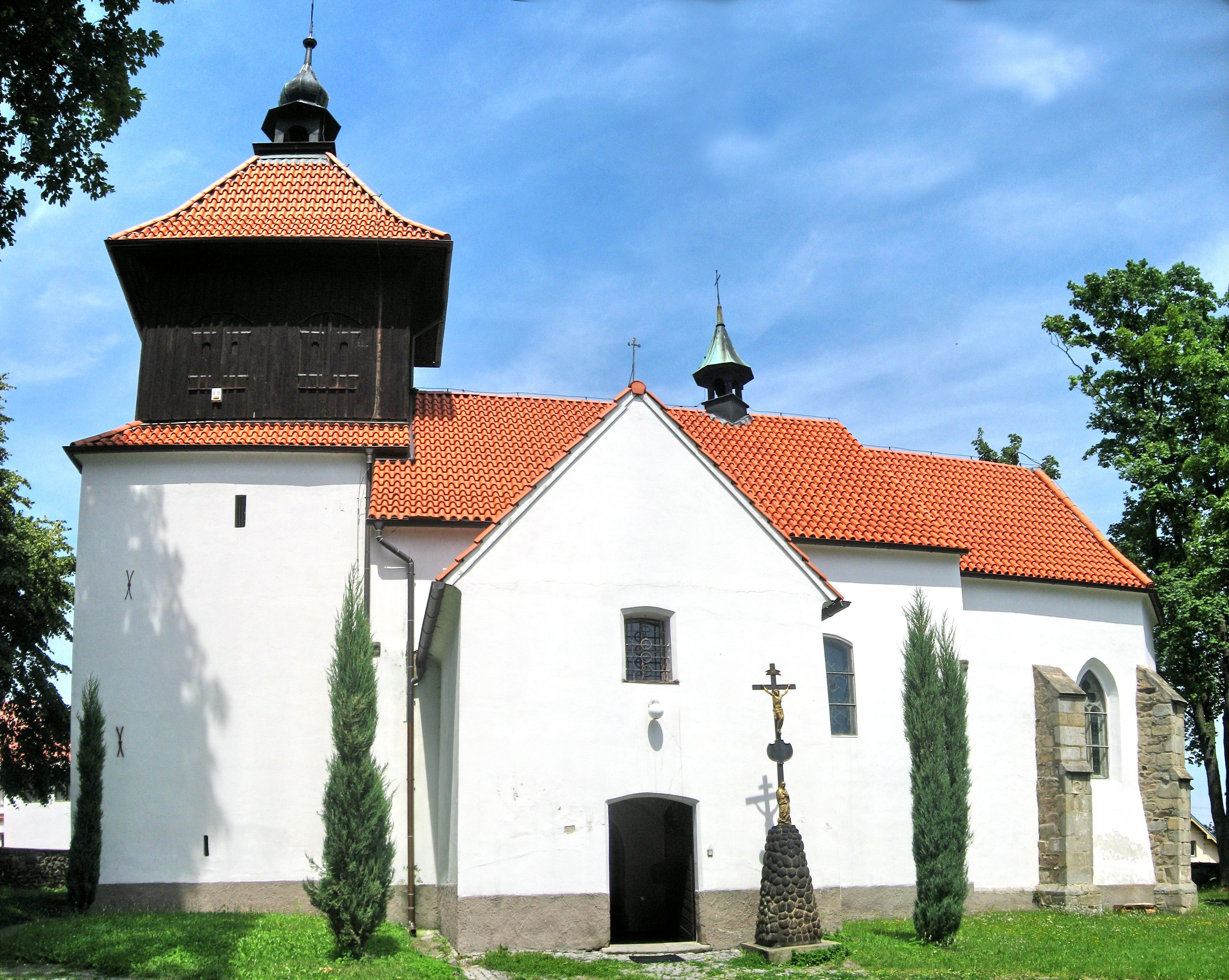 Lučice, kostel sv. Markéty stitched by Marku1988 This image was created with Hugin